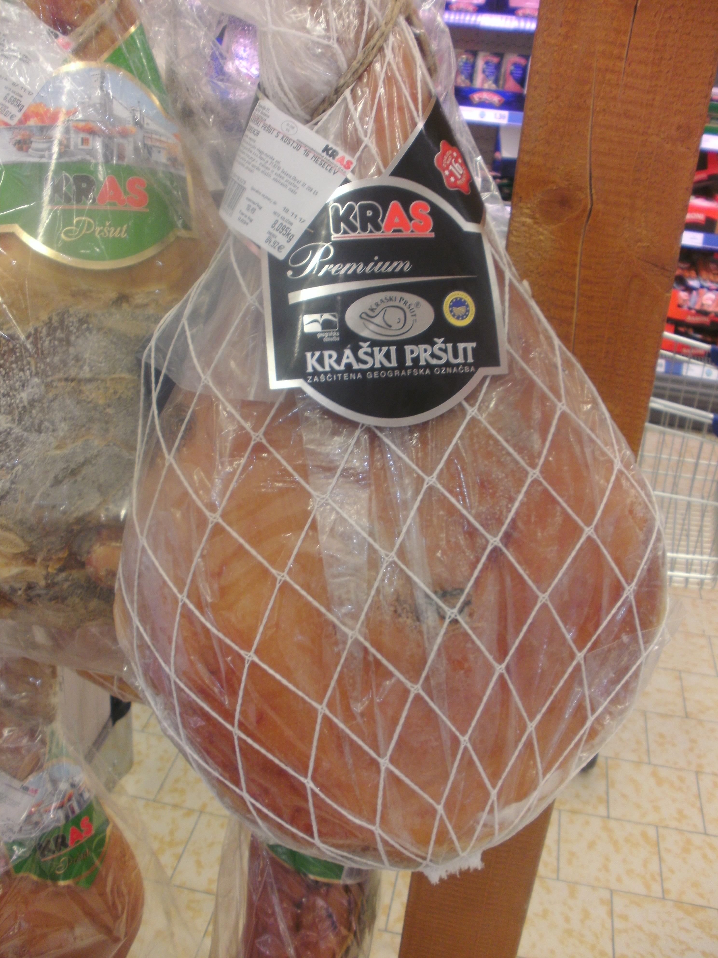 Kraški pršut z zaščiteno geografsko oznako porekla